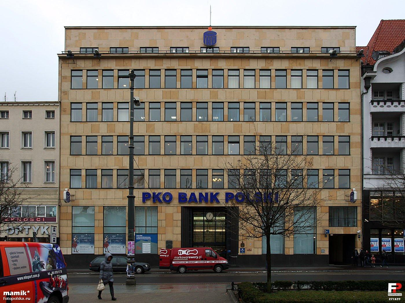 Modernistyczny budynek 1 Oddziału PKO BP